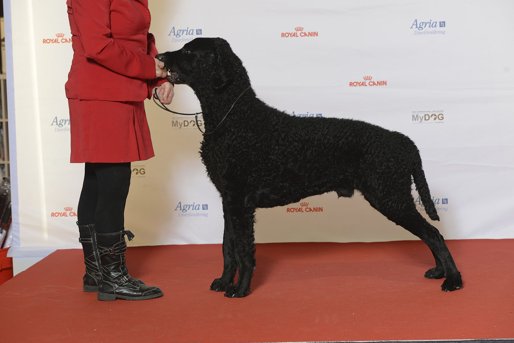 BIR Grupp 8 CURLY COATED RETRIVER Gladrags Secret Agent MyDOG, Nordens största hundevenemang